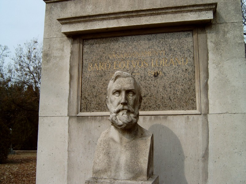 Eötvös Lóránd sírja Budapesten. Kerepesi temető: 10/1-1-9. Stróbl Alajos alkotása